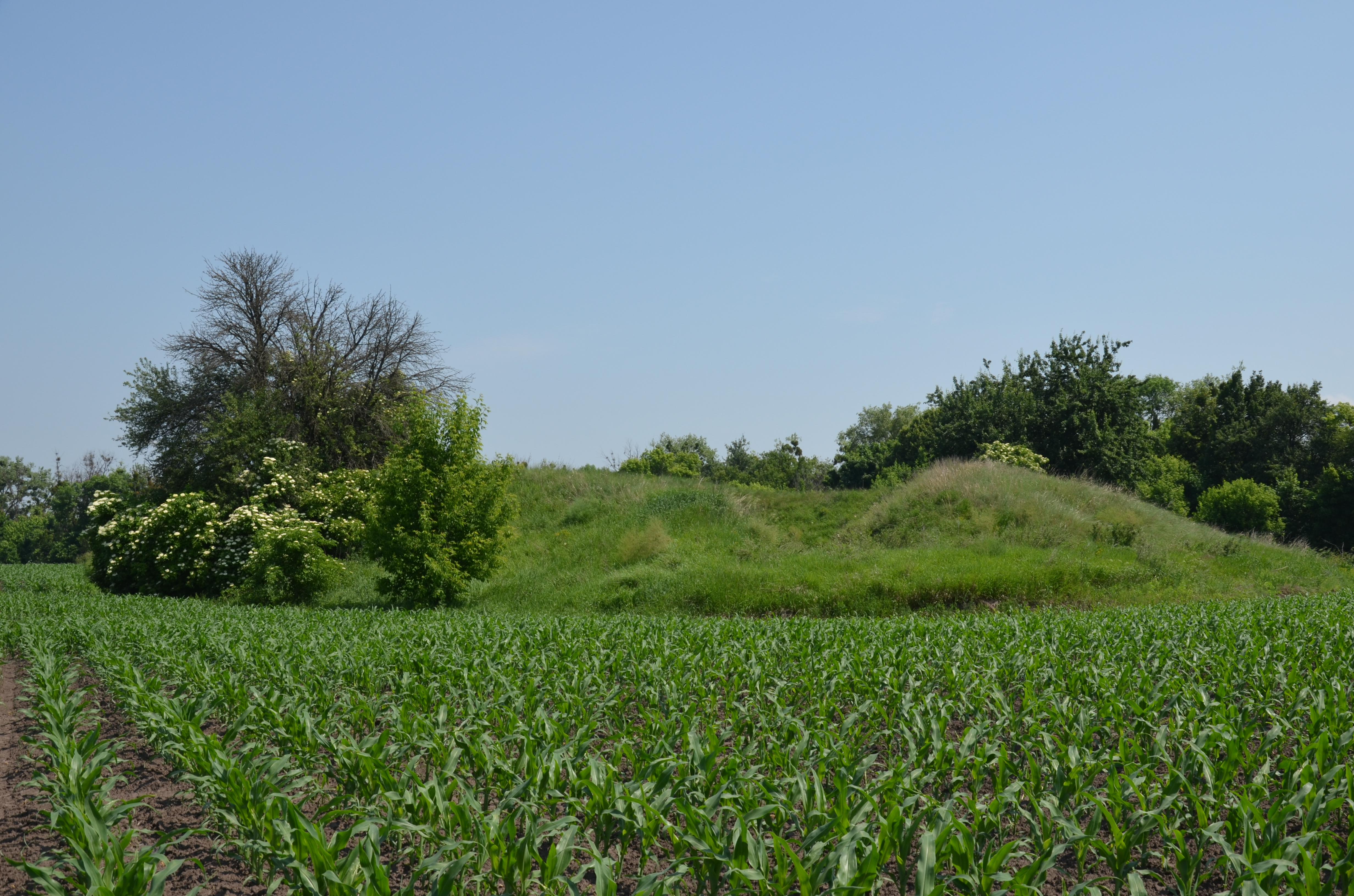 Роблена могила, Переяслав-Хмельницький район, Козлівська сільська рада